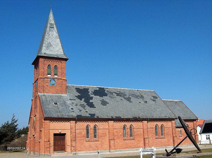 fra sydvest